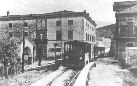 Lovere, via Gobetti